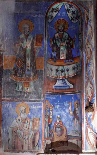 Фреска на Аврам Дичов от северната стена на протезиса на "Свети Никола" в Бърждани